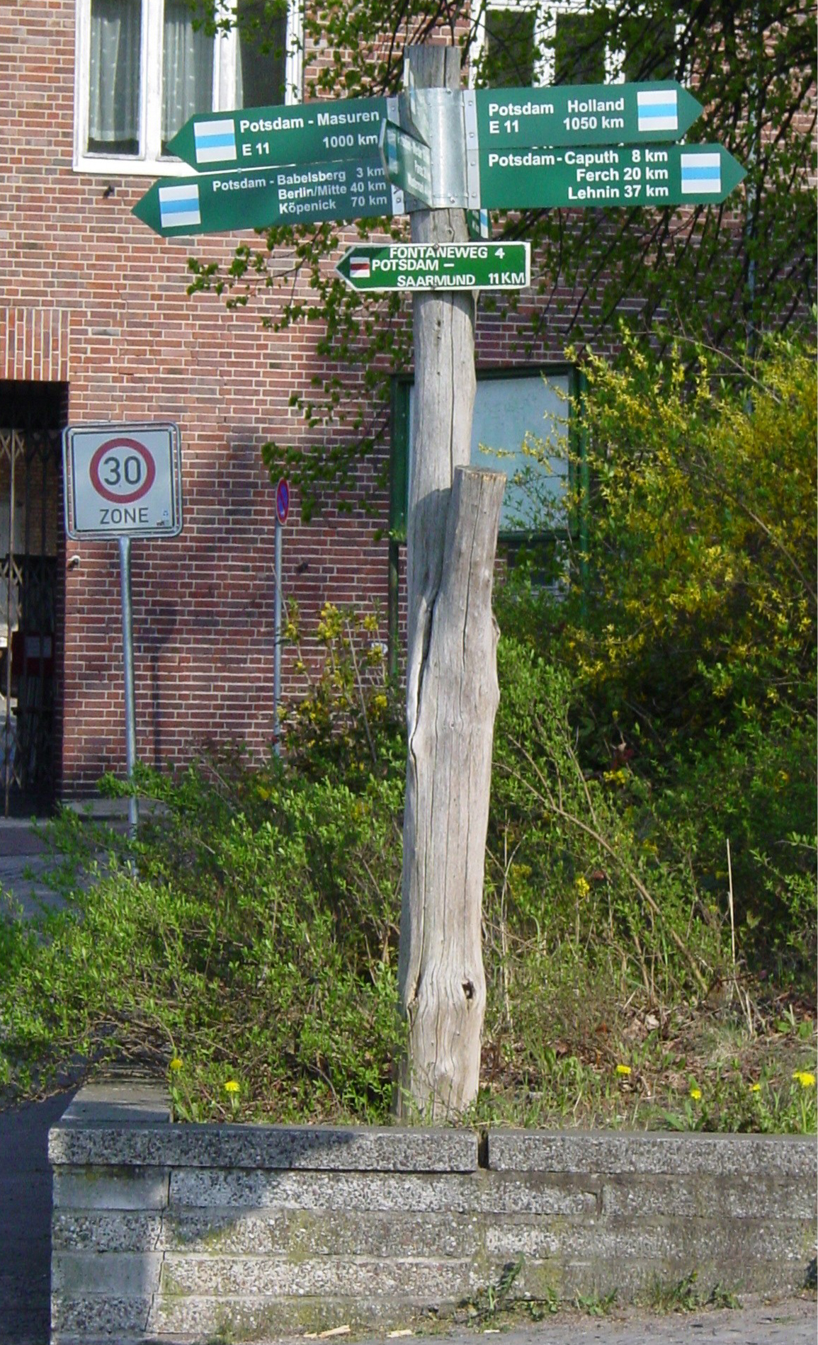 Eigenwerk d.d. 19-04-2007 te Potsdam, Duitsland Betreft wegwijzerpaal op kruising Europese wandelroute E10 en E11.